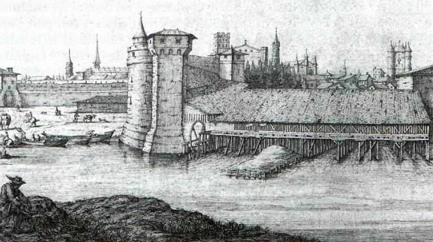 Les moulins du Bazacle de Toulouse, en 1642, vus par François Colignon.